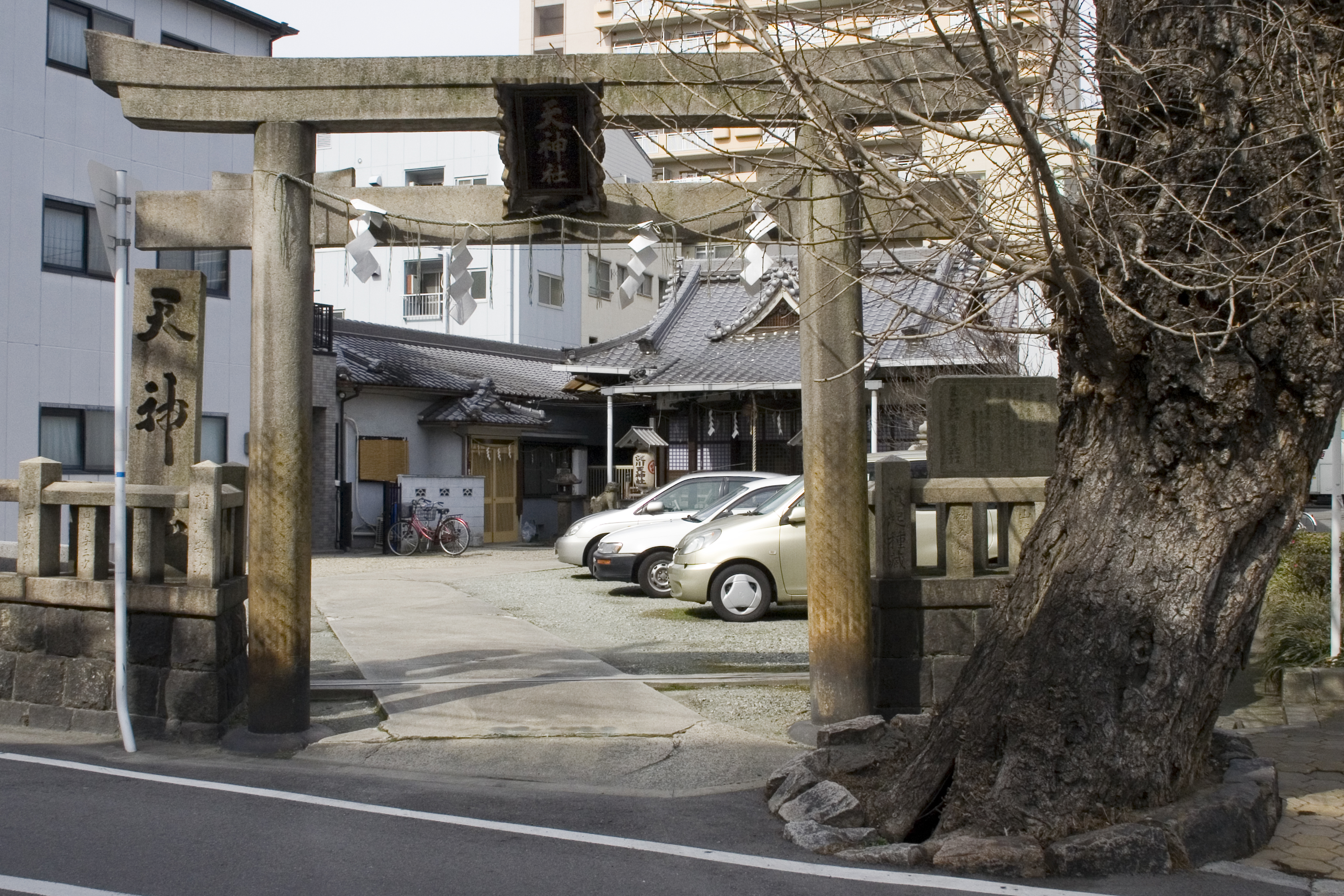 淀川天神社